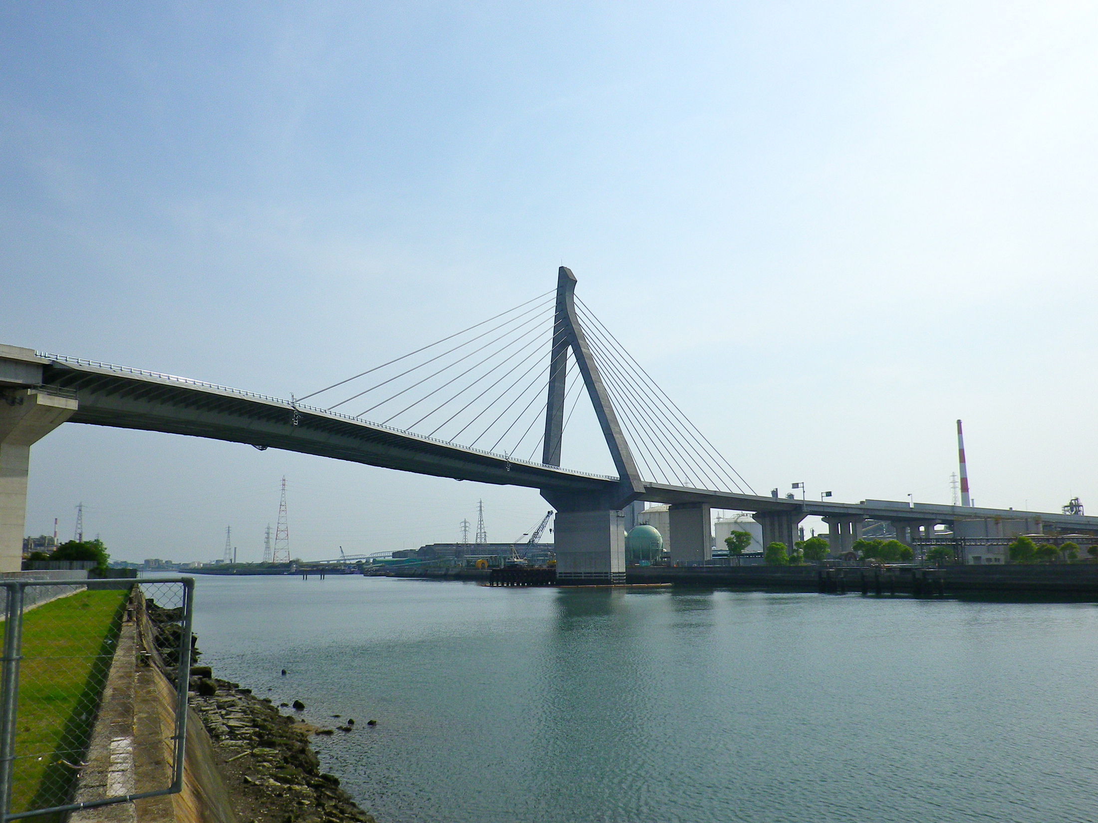 山口県宇部市、宇部湾岸道路栄川運河橋。